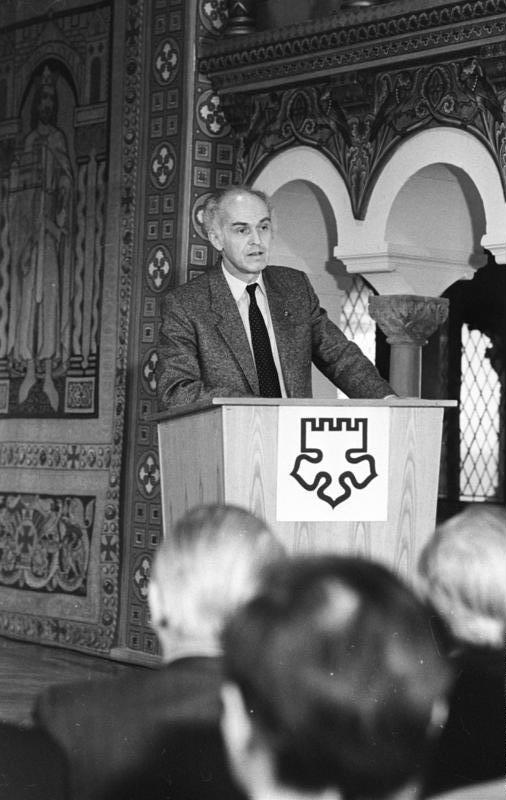 ADN-ZB/Ludwig/21.3.83 Bez. Erfurt: Lutherkonferenz Die sprachwissenschaftliche Leistung Martin Luthers und ihre Bedeutung für Geschichte und Gegenwart stehen im Mittelpunkt einer internationalen Konferenz, die auf der Wartburg in Eisenach eröffnet wurde. Klaus Höpcke, Stellvertreter des Ministers für Kultur, hielt den Eröffnungsvortrag zum Thema "Luthers Sprachschaffen: Was gibt es dem, der heute schreibt und redet".